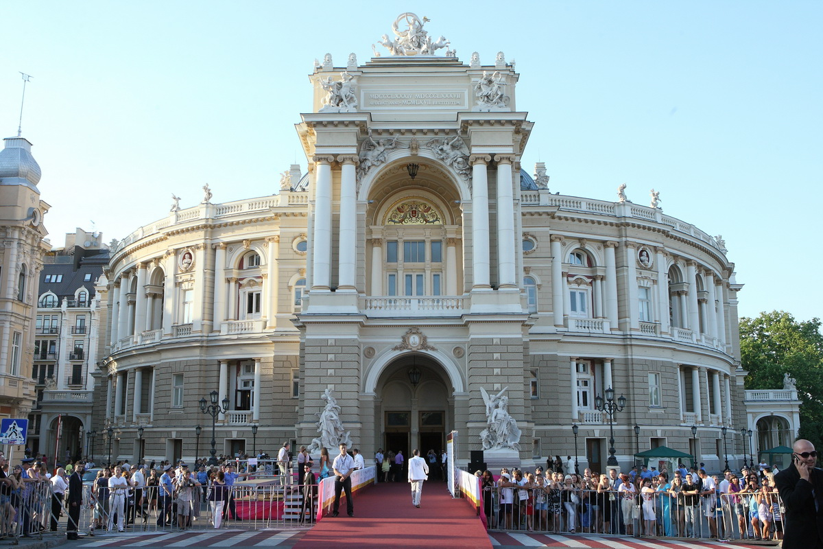 Одесский оперный театр - место проведения церемонии открытия и закрытия Одесского международного кинофестиваля